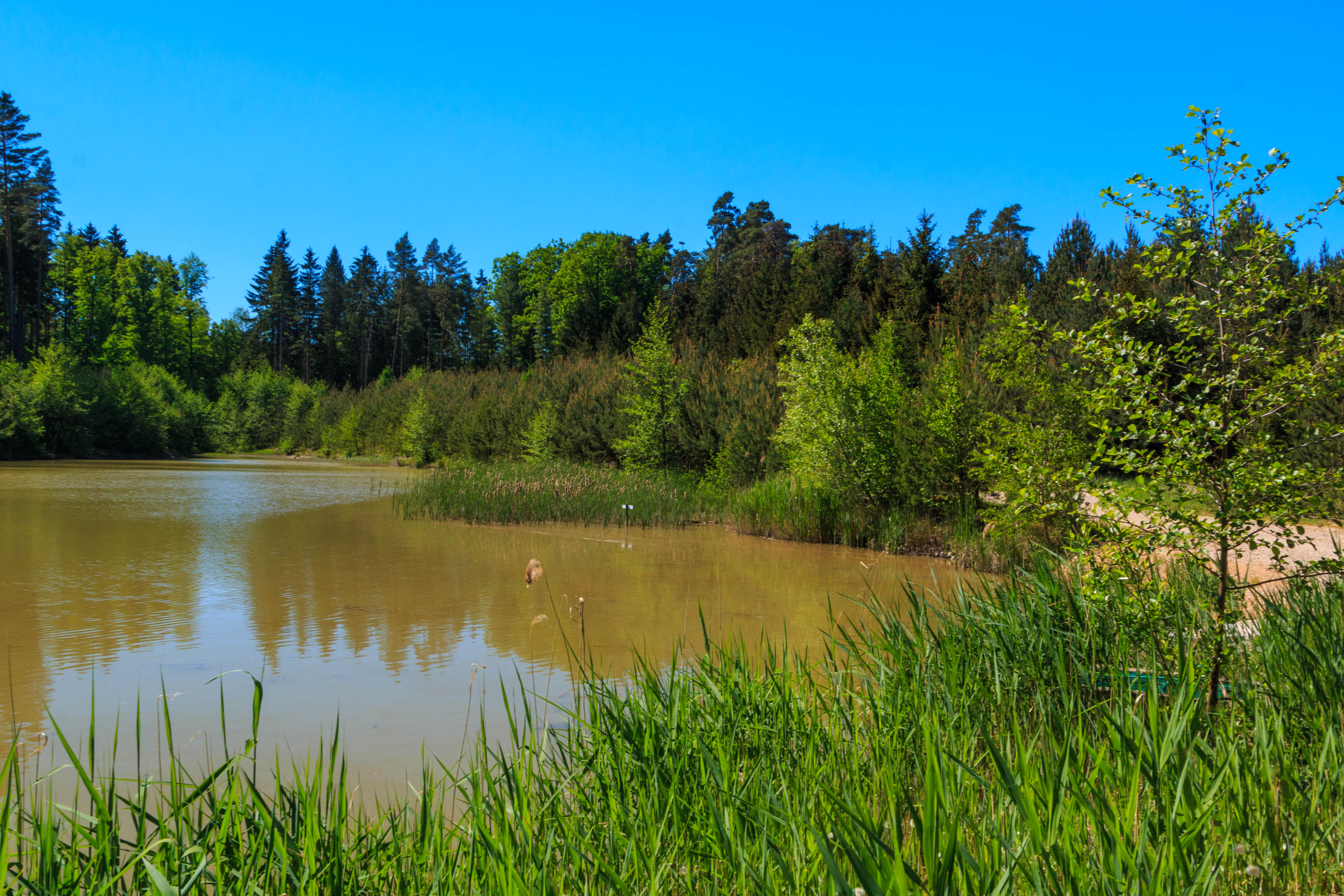 rybník Na Olšině Project: Vodstvo.